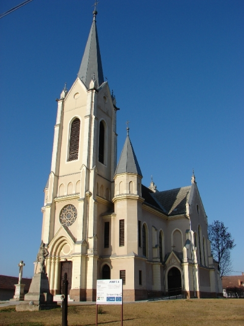 Szelevény falu katolikus temploma